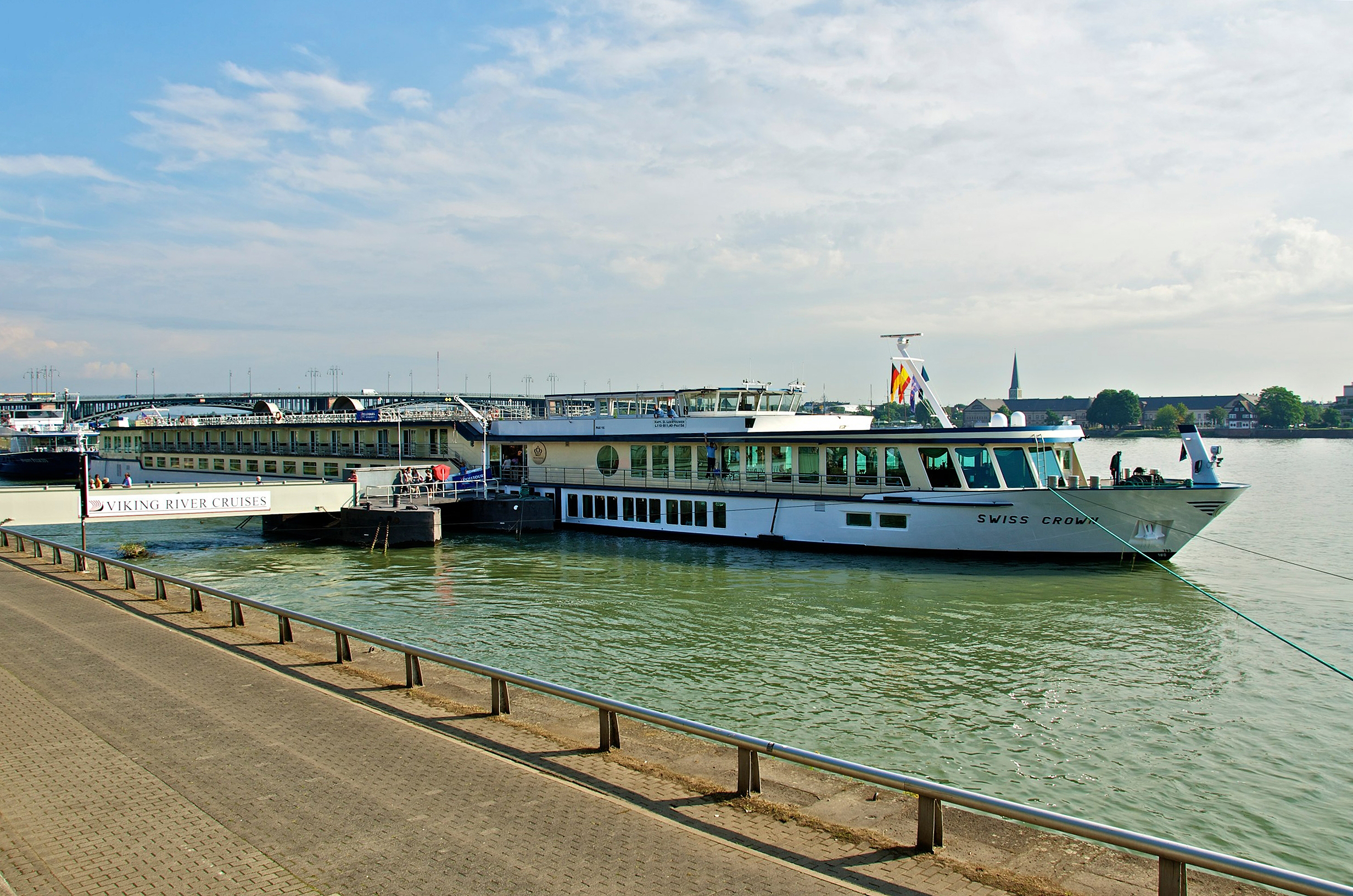 Kabinenfahrgastschiff Swiss Crown in Mainz